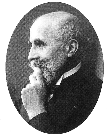 Portrait de Jean-Amédée Gibert